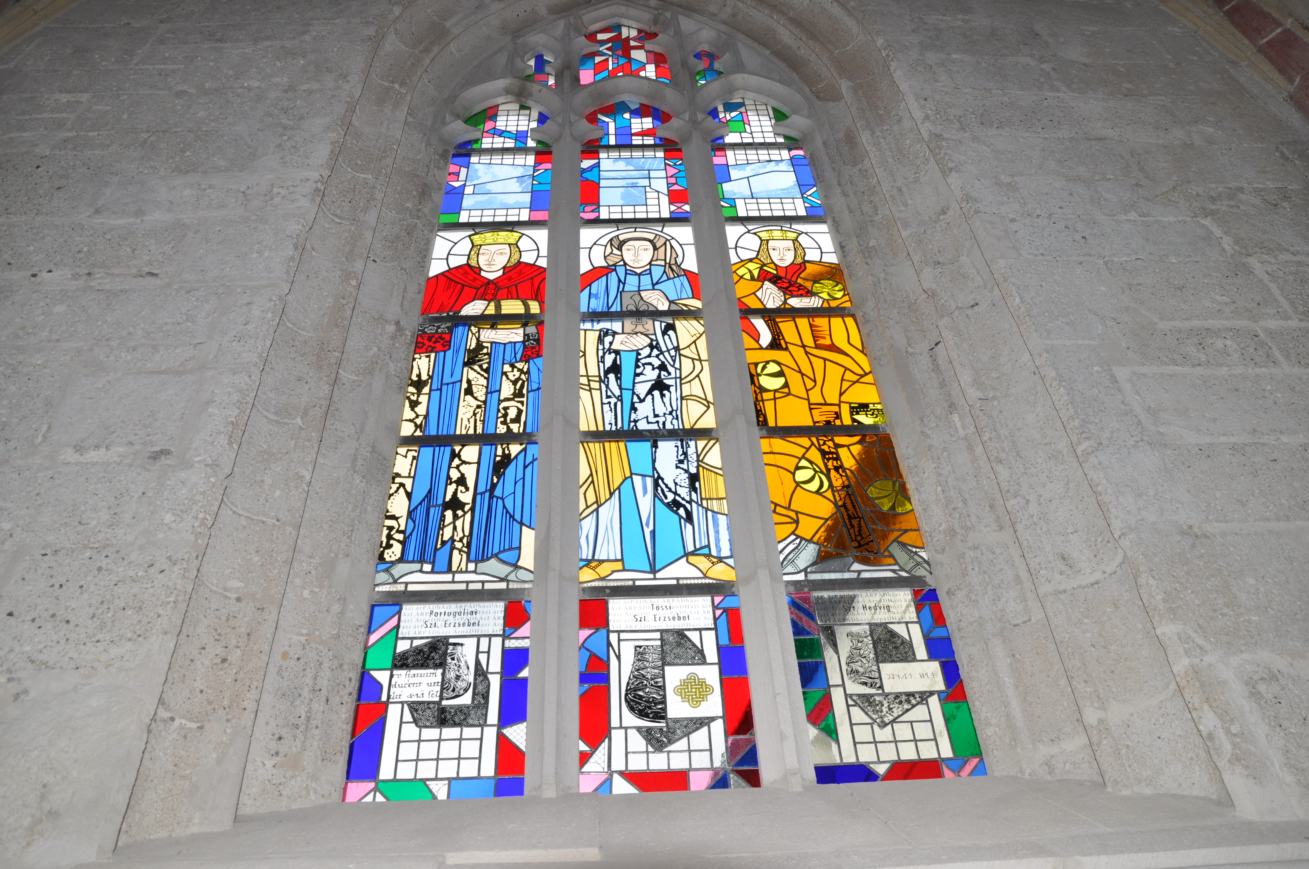 Az újjáépült Füzér vára, a várkápolna ablaka